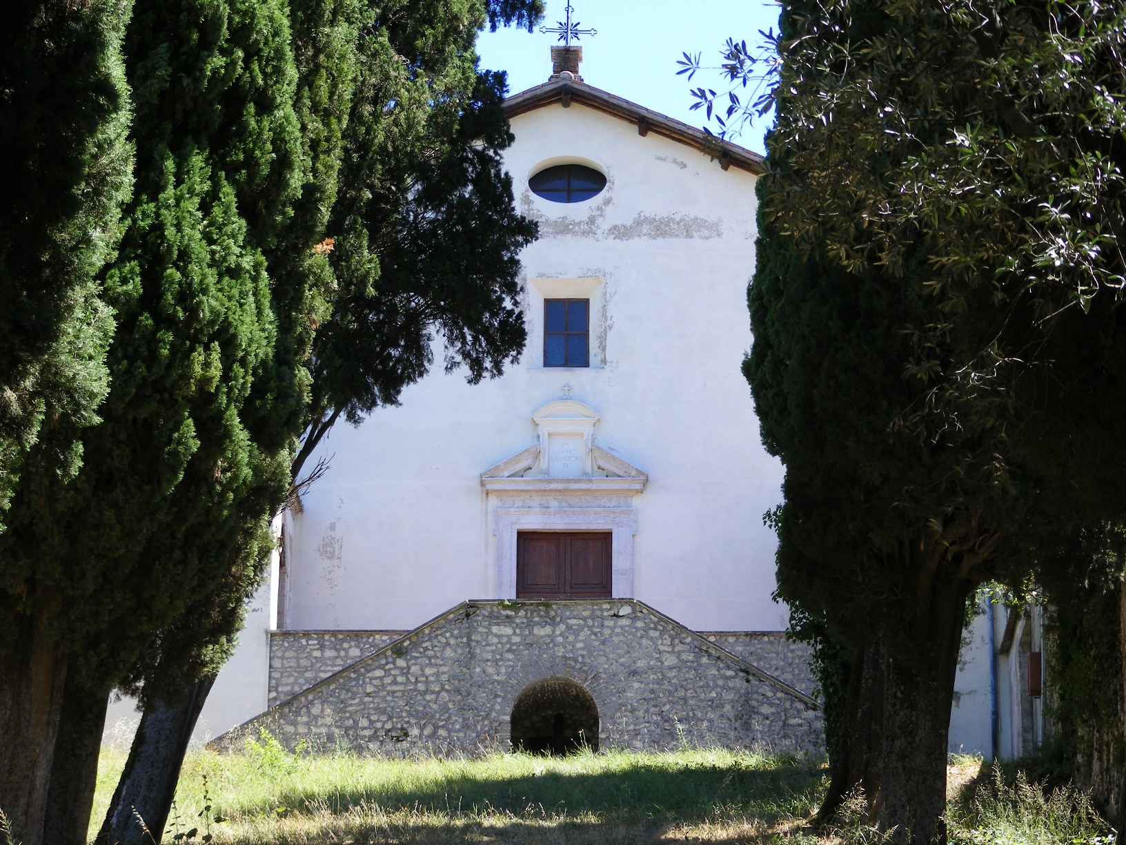 La chiesa del Santissimo Salvatore di Montefiolo (Casperia, Ri)